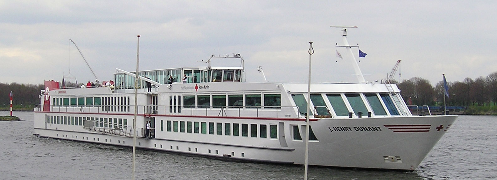 J. Henry Dunant III, aanleggen Grave